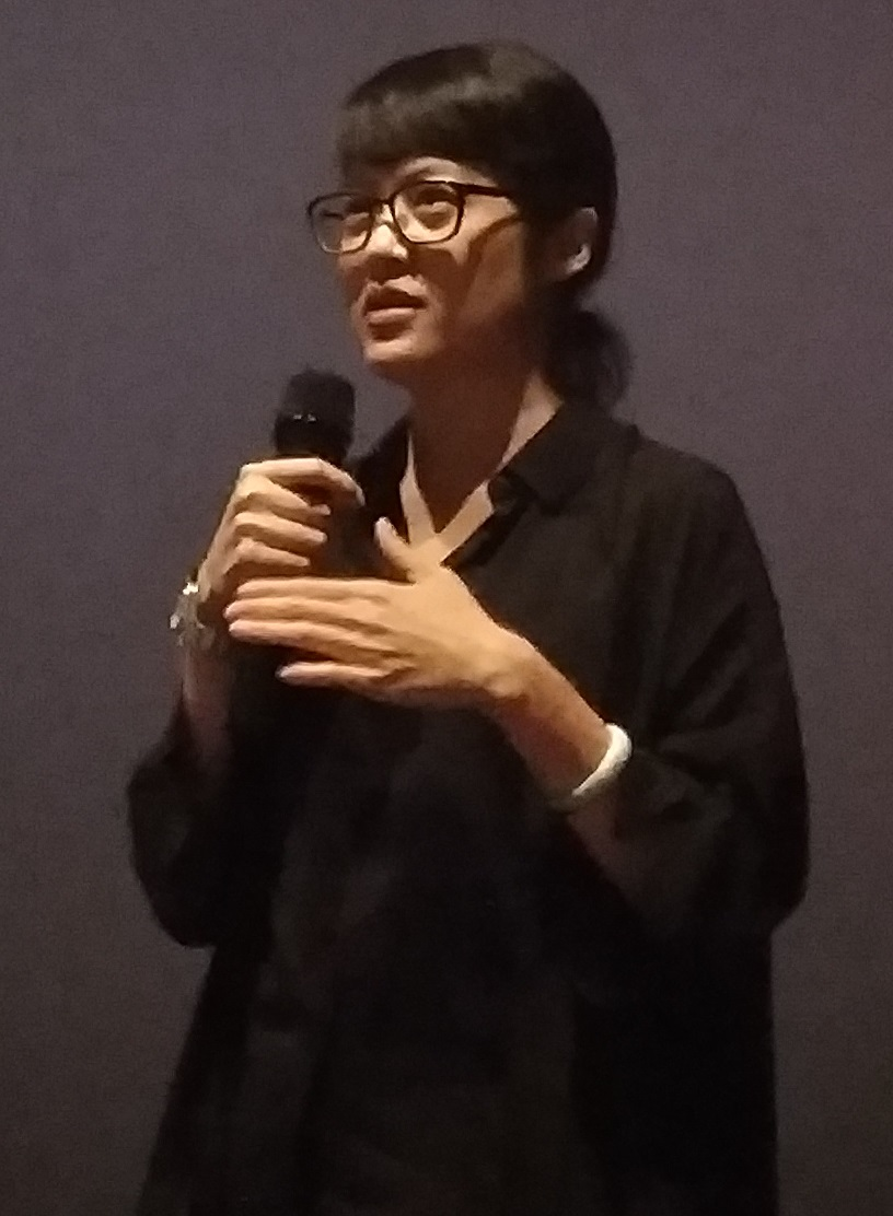 謝沛如，台灣導演，攝於2019年